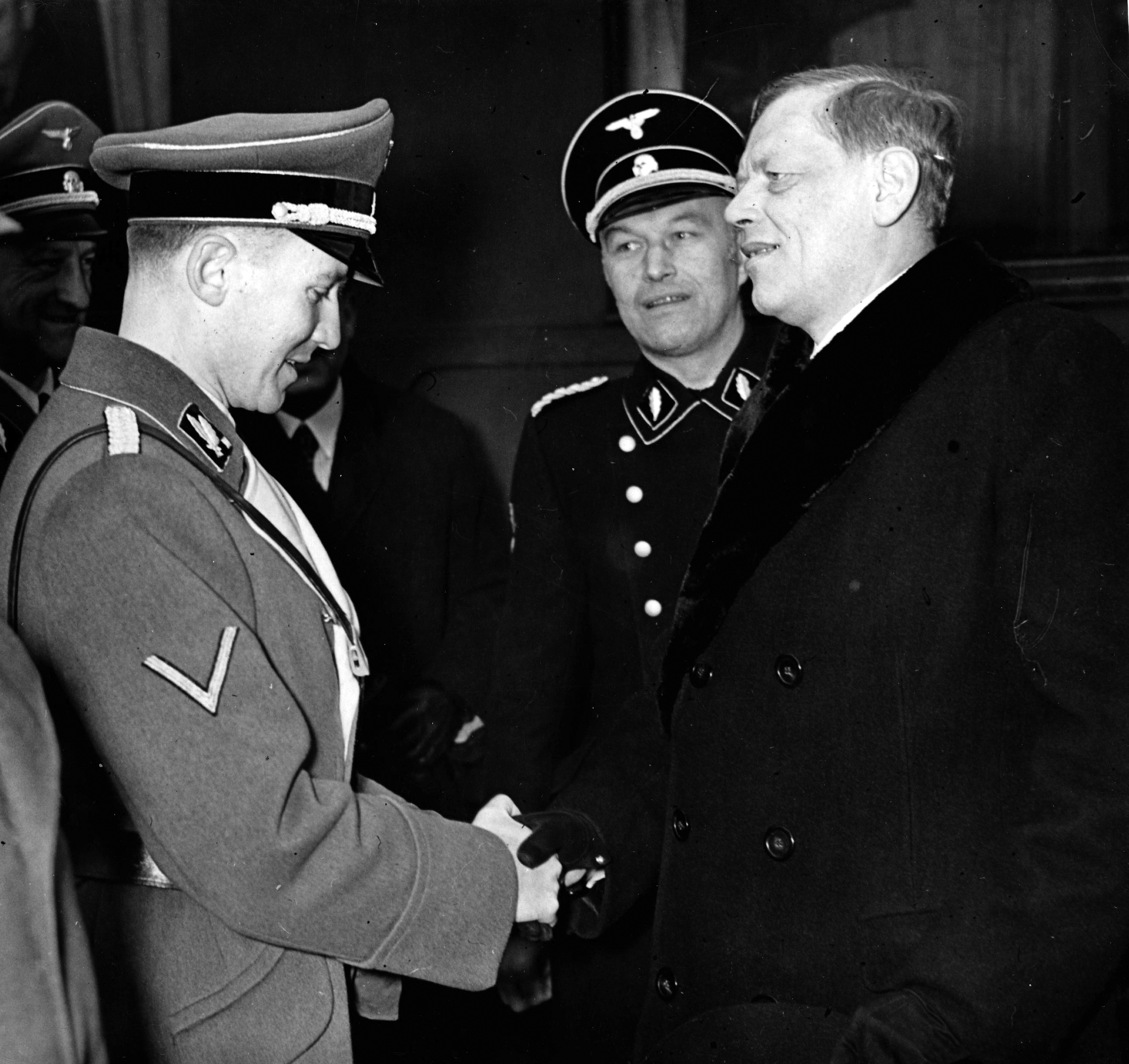 Gubernator Otto von Wachter (z lewej) wita na dworcu w Krakowie dyrektora muzycznego Filharmonii Wiedeńskiej Hansa Knappertsbuscha